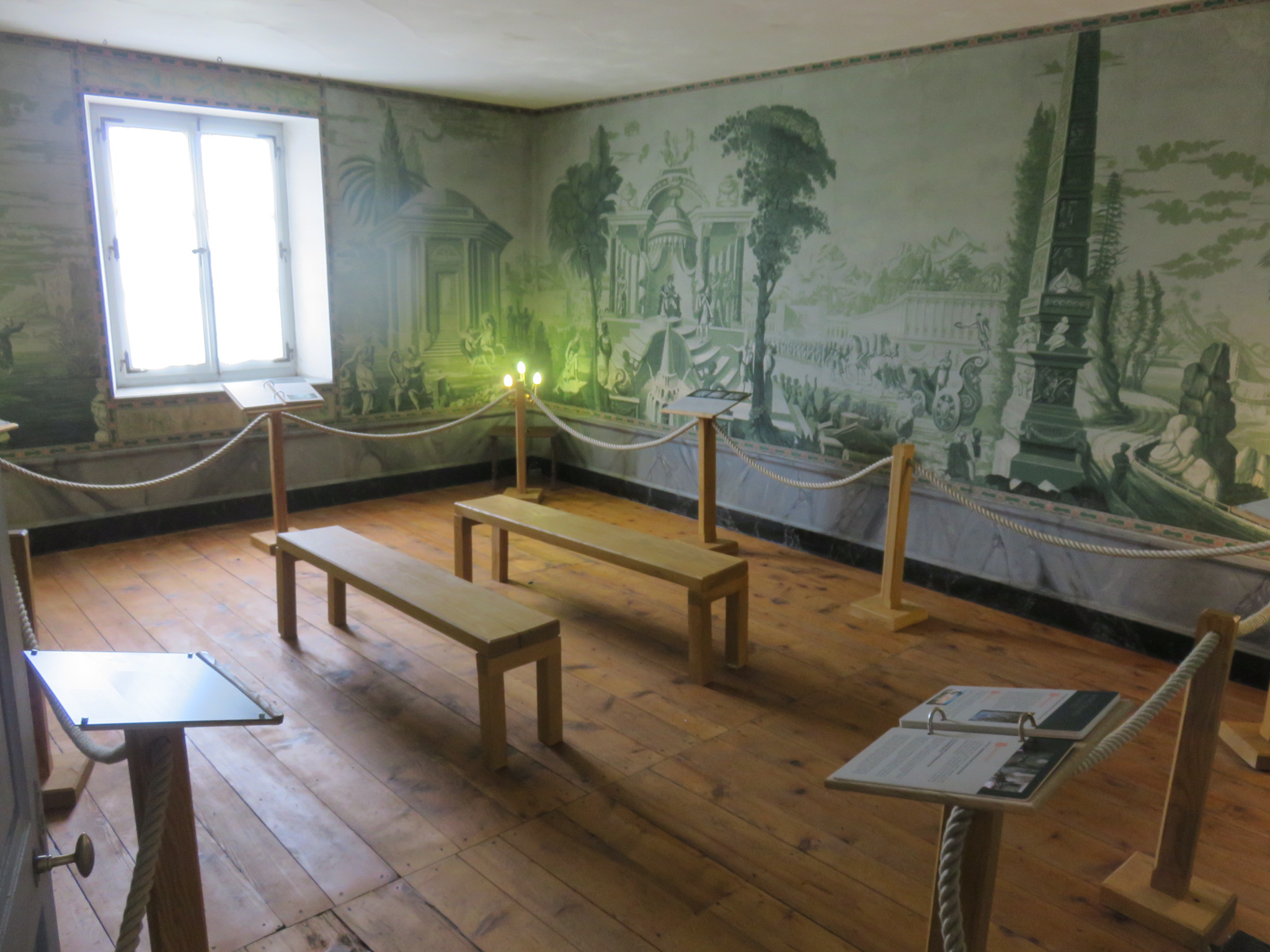 Presbytère de Remoray-Boujeons